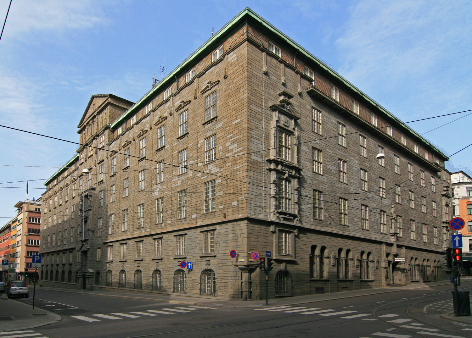 Telegrafbygningen, Kongens gate 21, Oslo. Bygd 1916-24; arkitekt Arnstein Arneberg og Magnus Poulsson.